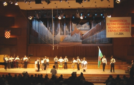 Romsko kulturno-umjetničko društvo Darda, nastup u KD Vatroslava Lisinskog, Zagreb, 2004.